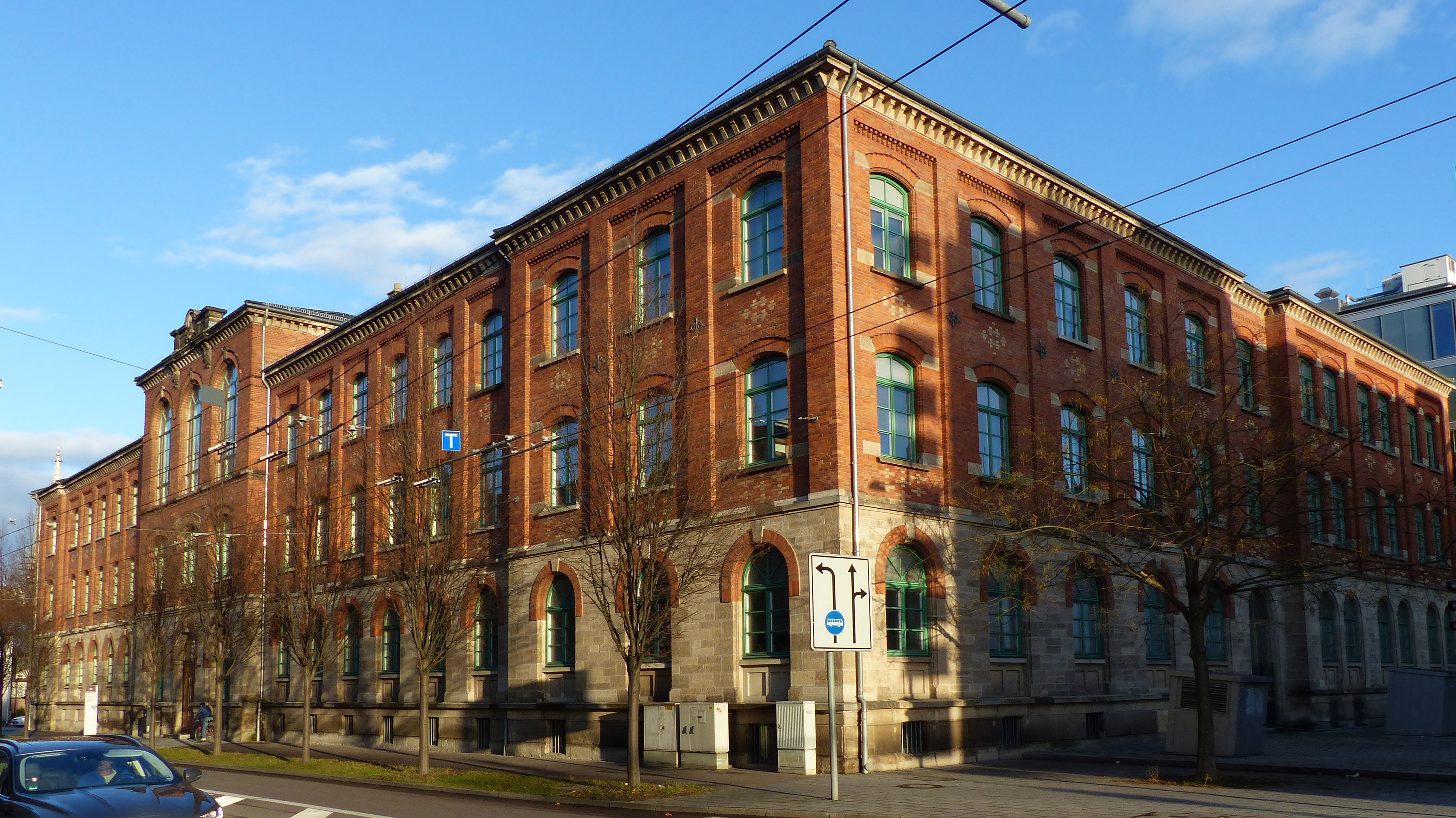 Berliner Straße 12, Esslingen am Neckar - Sitz des Landesamtes für Denkmalpflege Baden-Württemberg